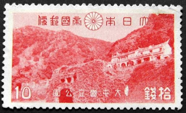 台湾を植民地にしていた時期に日本が設置していた大屯国立公園のうち、10銭切手。